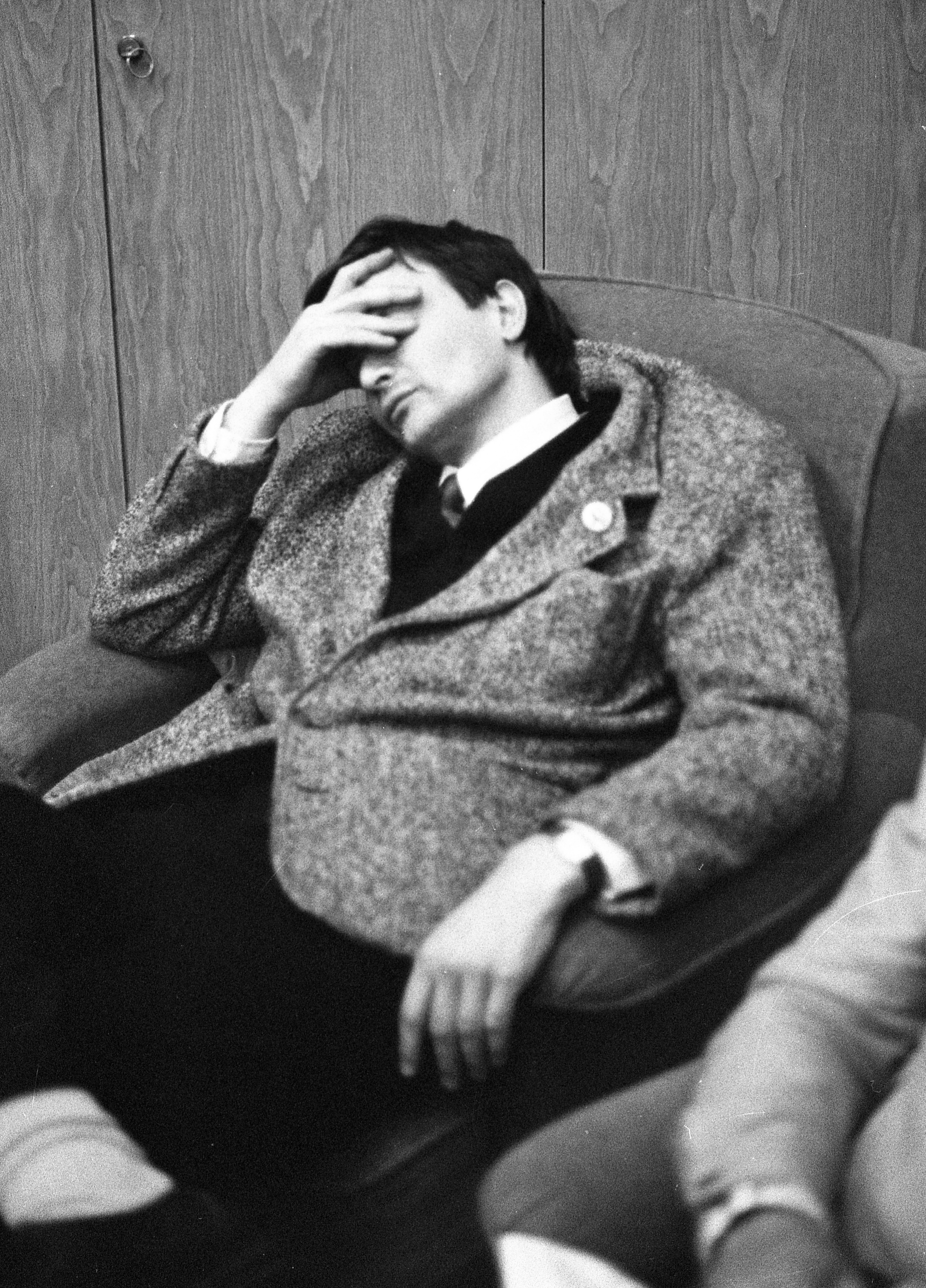 Demszky Gábor. Location: Hungary Tags: politics Title: Demszky Gábor.